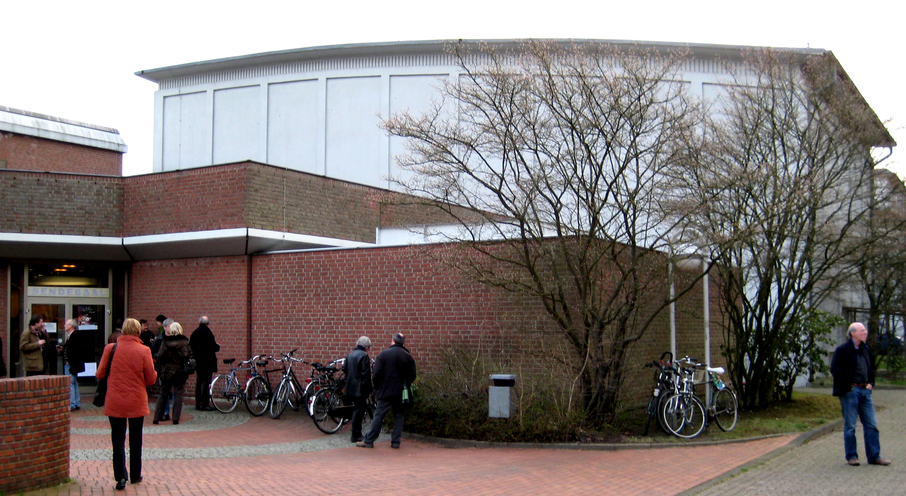 „Sendesaal Bremen“ in Bremen-Schwachhausen, frühere Bezeichnung: „Radio Bremen Sendesaal (Studio F)“ (hinteres, graues Gebäude; Baujahr 1952); davor Foyer-Anbau (Backsteingebäude/Flachbau; in den 1980er-Jahren angebaut)